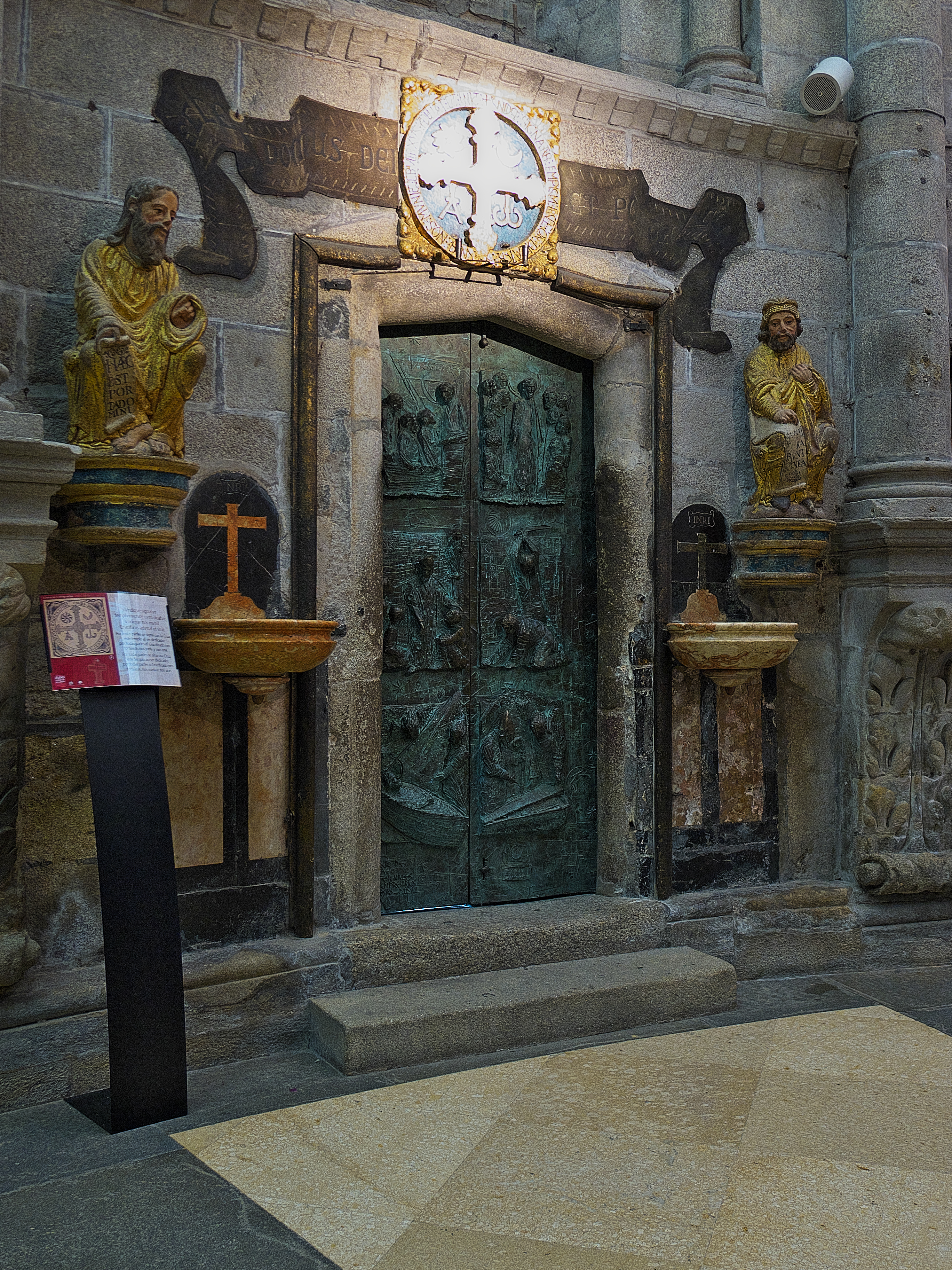 Situada en el muro del deambulatorio de la Catedral, que nos debe recordar al maestro Bernardo el Viejo, ligeramente desviada de oriente. Queda abierta en los años jubilares.